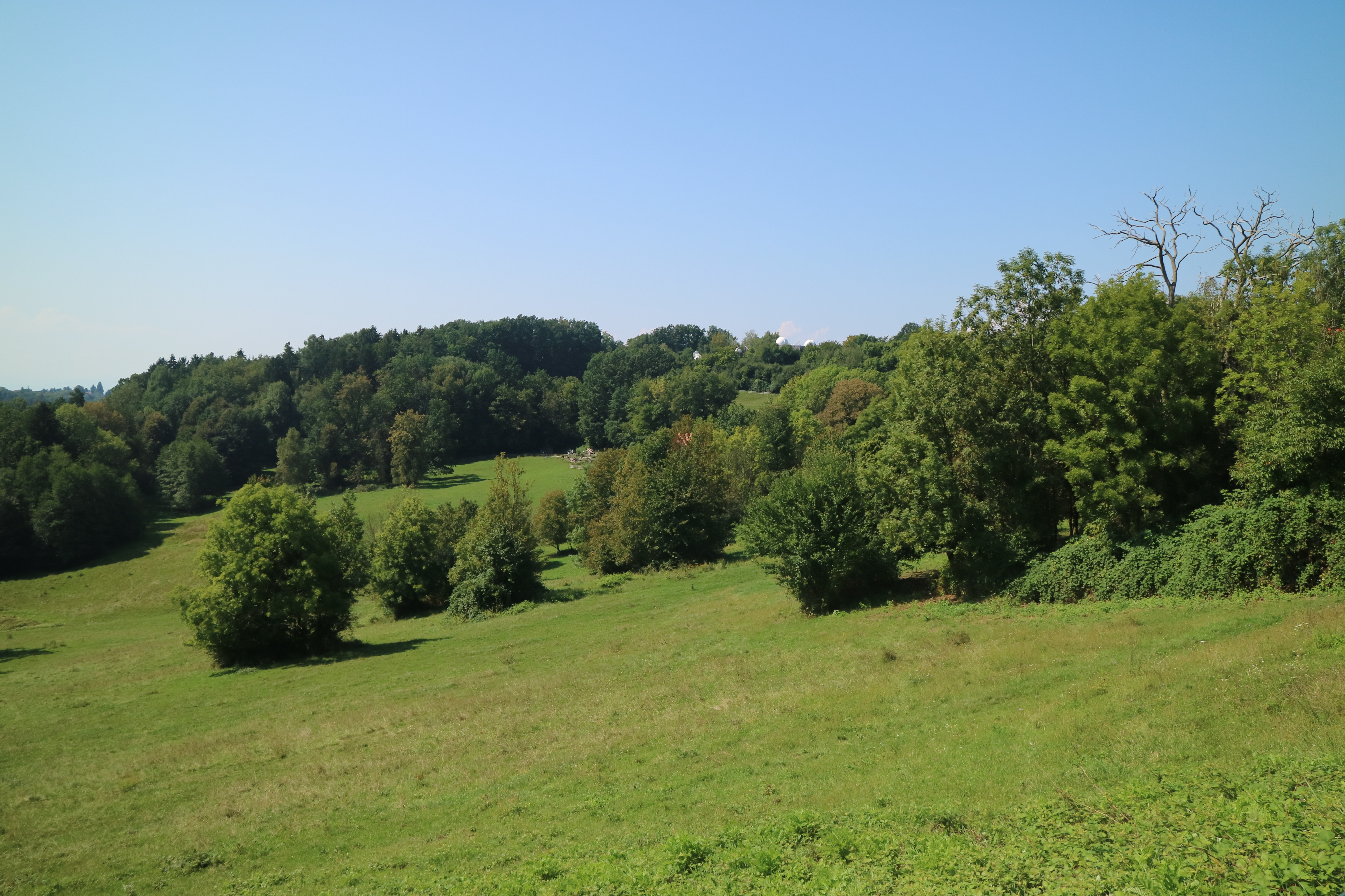 This media shows the nature reserve in Styria with the ID NSG 62 c. Lustbühel von Nordosten, Graz-Waltendorf